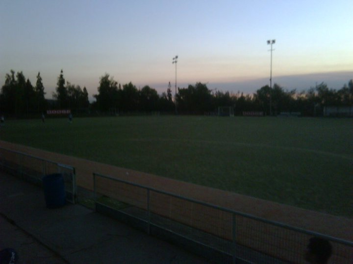 Cancha de Hockey Sintética Estadio San Carlos de Apoquindo